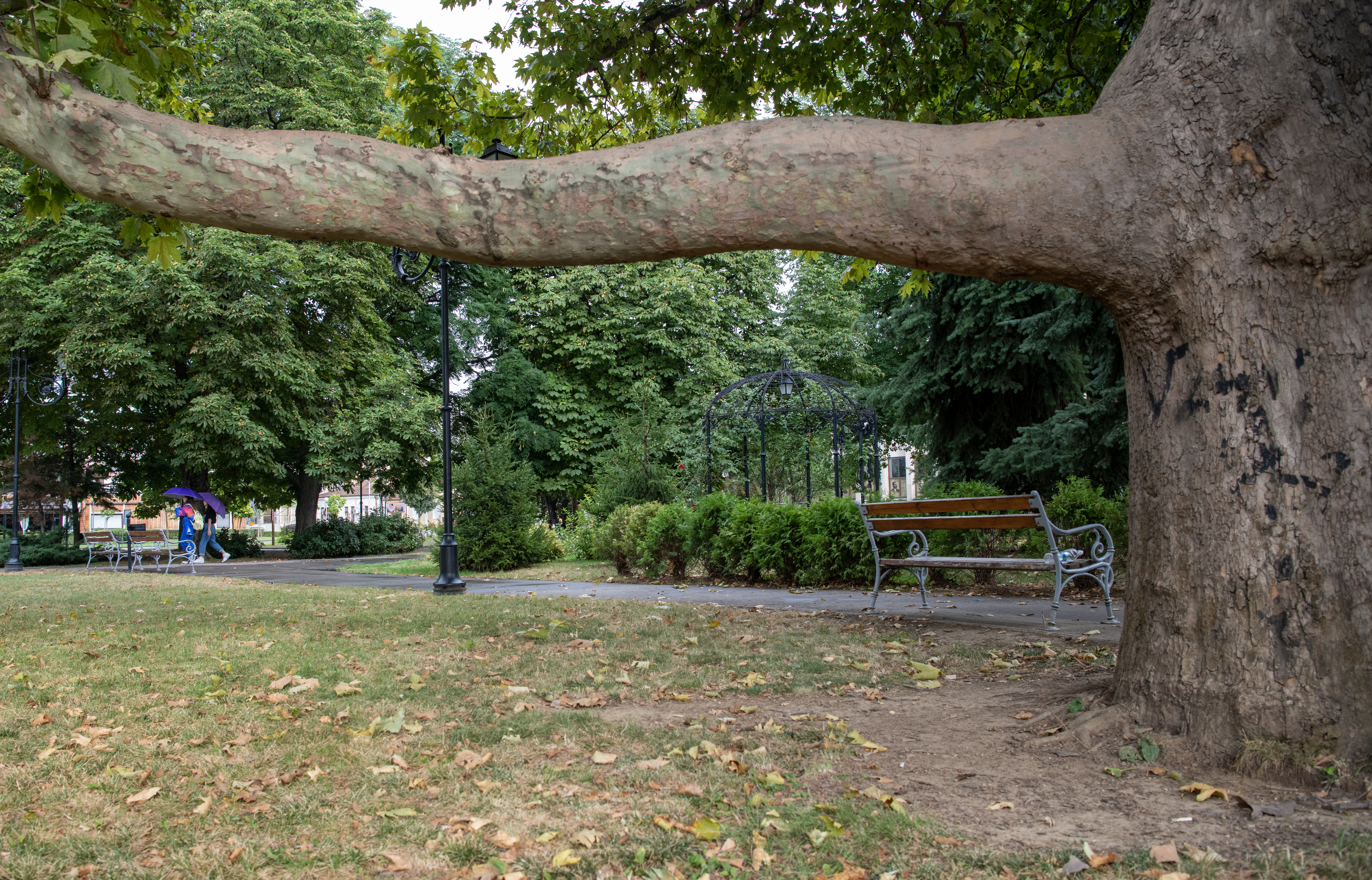 Снимката документира градината на пл. "княз Александър Батенберг" в град Русе.